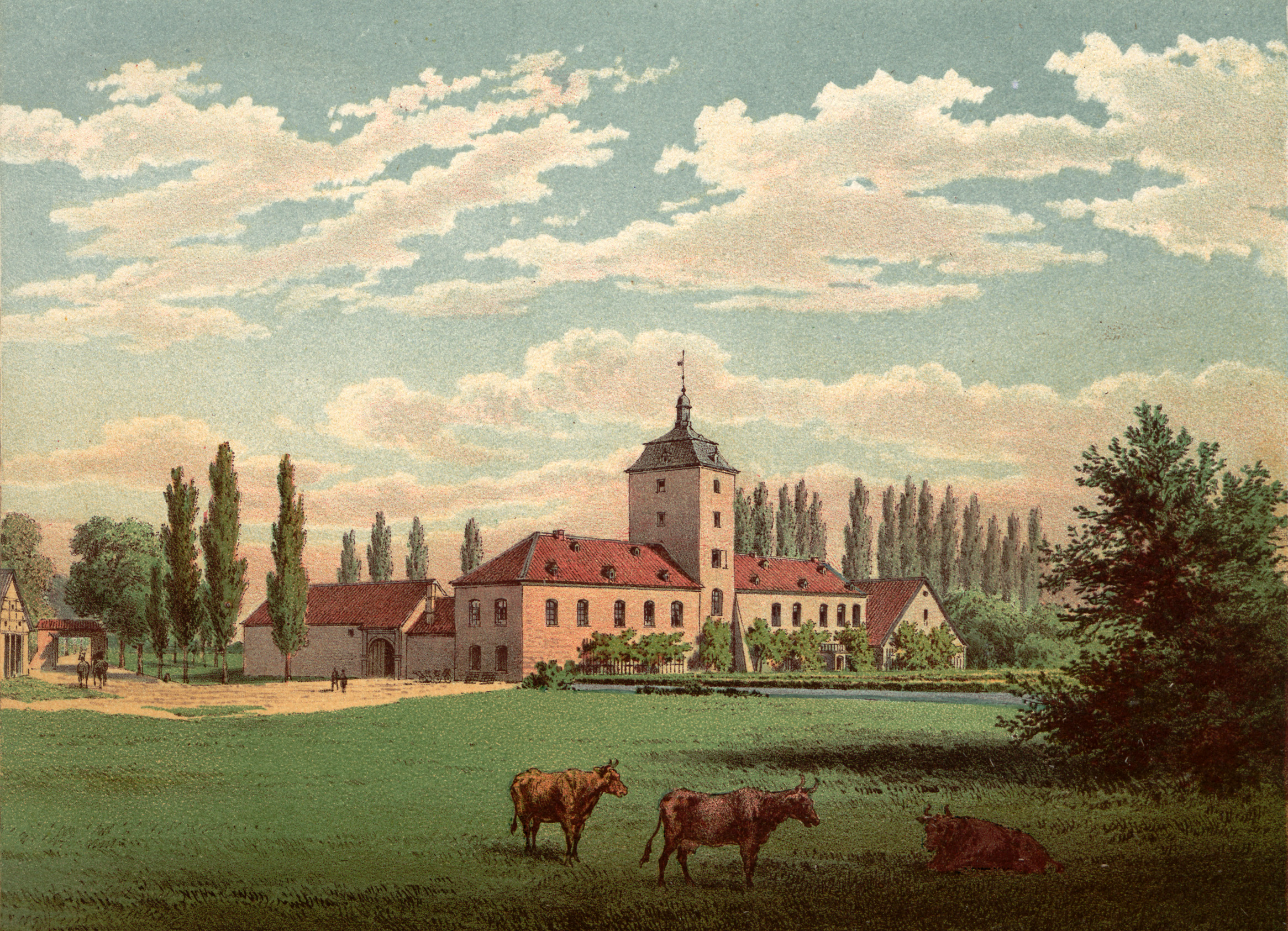 Rittergut Velbrüggen (Vellbrüggen), Kreis Neuss, Rheinprovinz